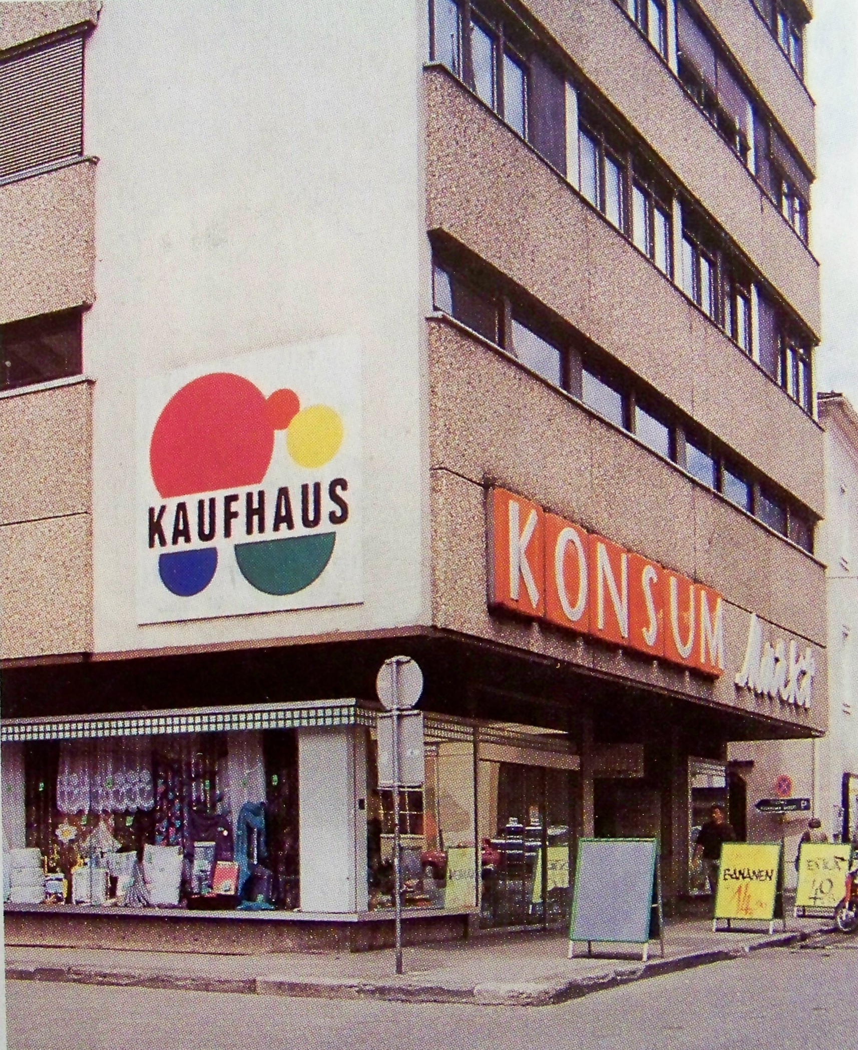 Konsum-Markt Bad Ischl am Auböckplatz, von 1973 bis 2011 Standort einer Filiale der Konsumgenossenschaft Salzkammergut.